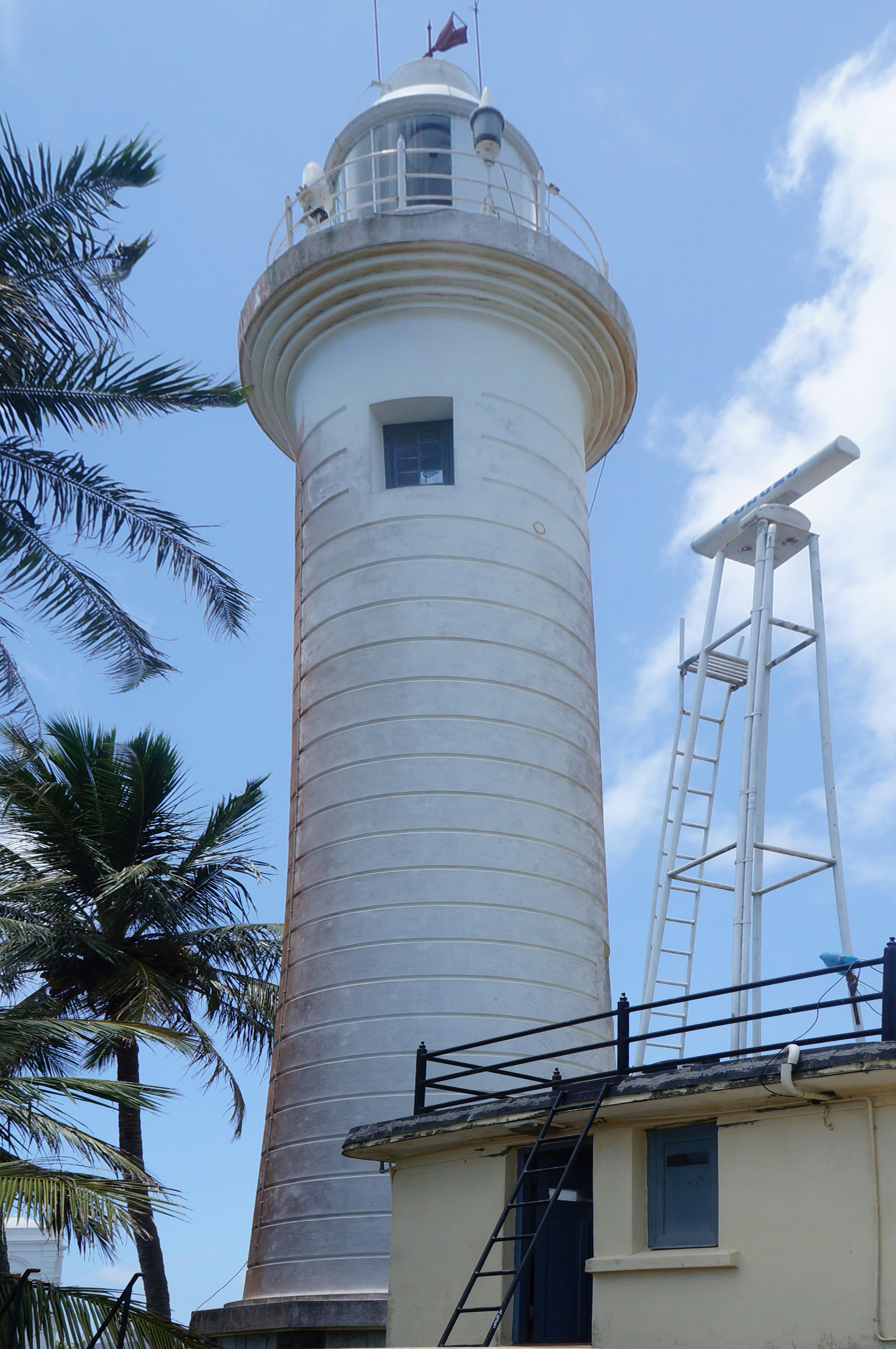 Les remparts du fort Old dutch Galle Sri Lanka.-Asie du Sud